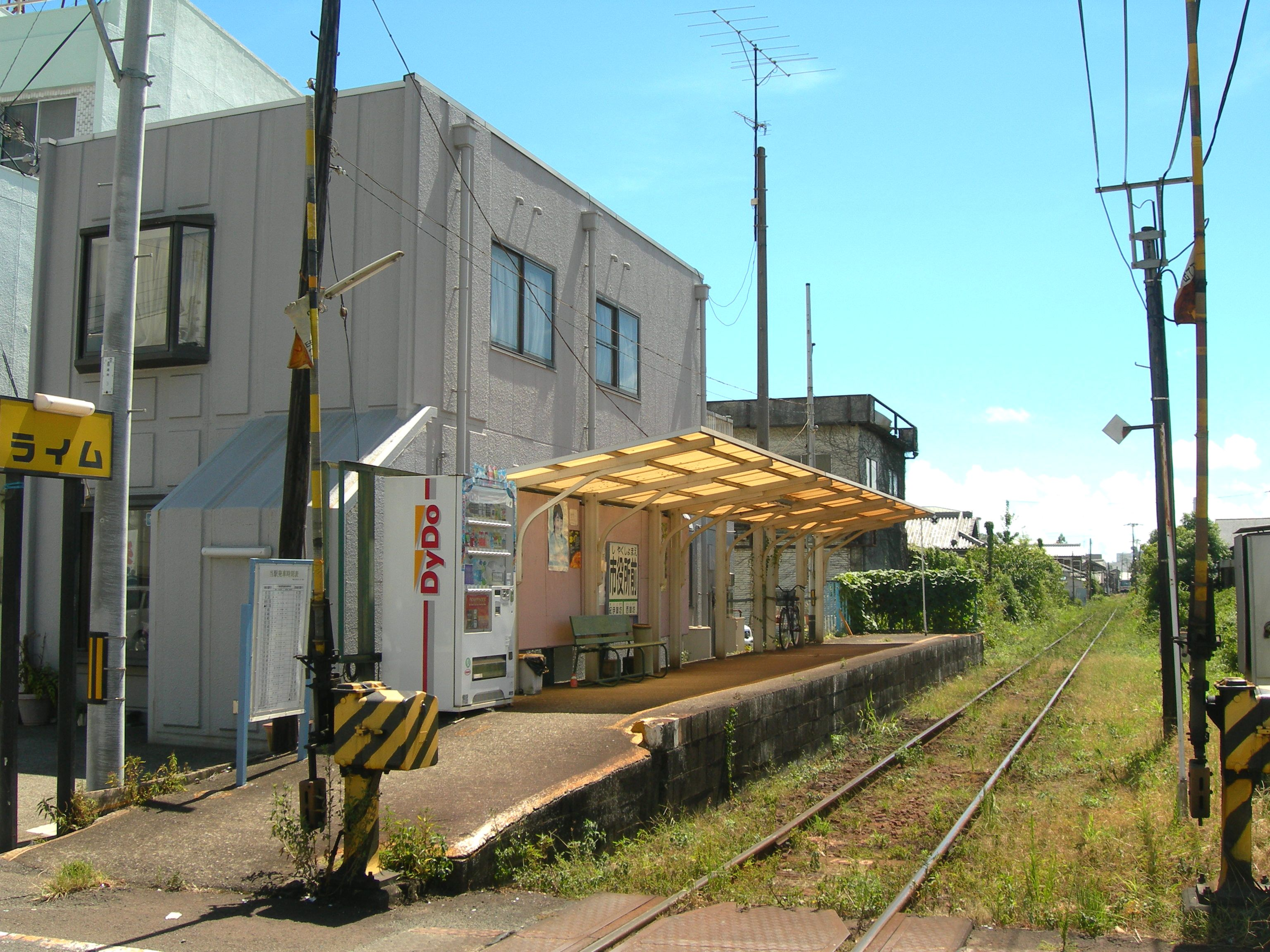 紀州鉄道線 市役所前駅